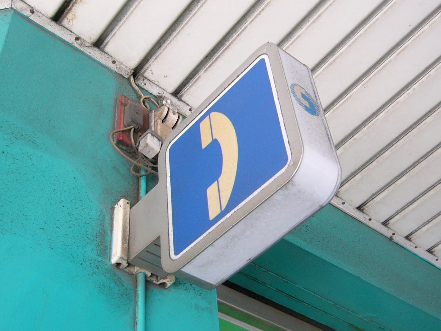 中華電信的公用電話標示燈箱